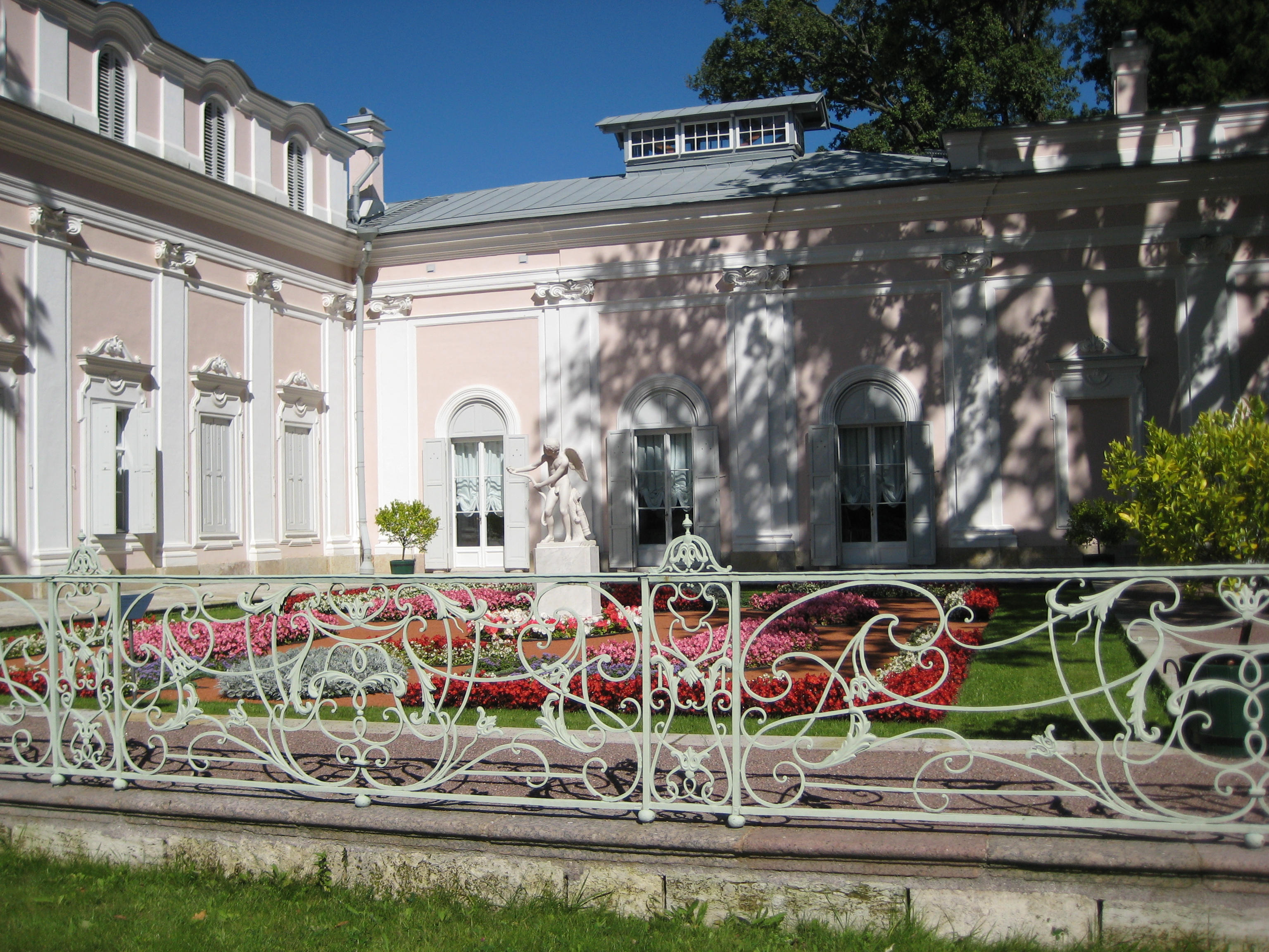 Ломоносов. Верхний парк. Скульптура "Амур с луком" у Китайского дворца.